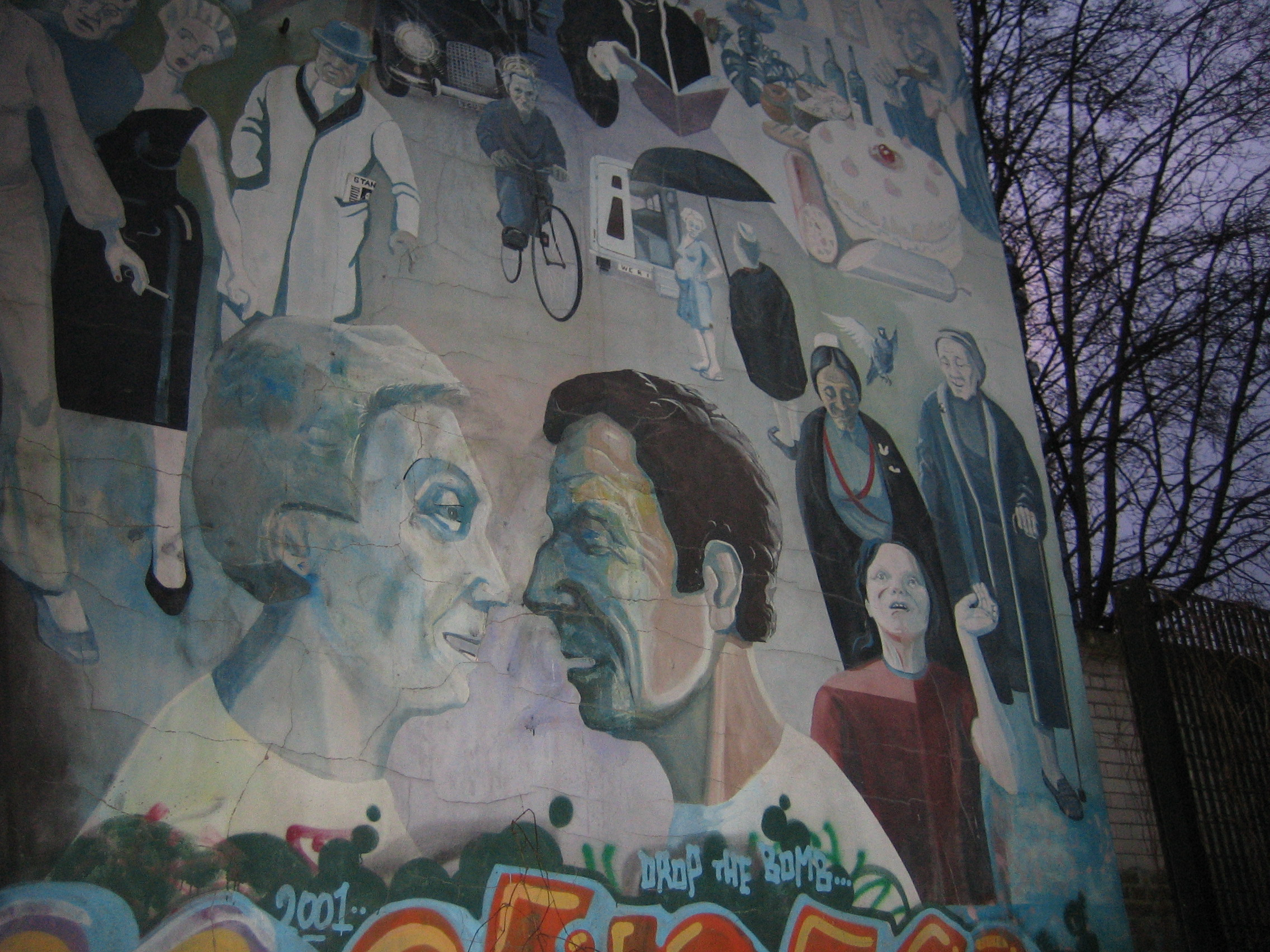 Mural in Fitzrovia, London, UK